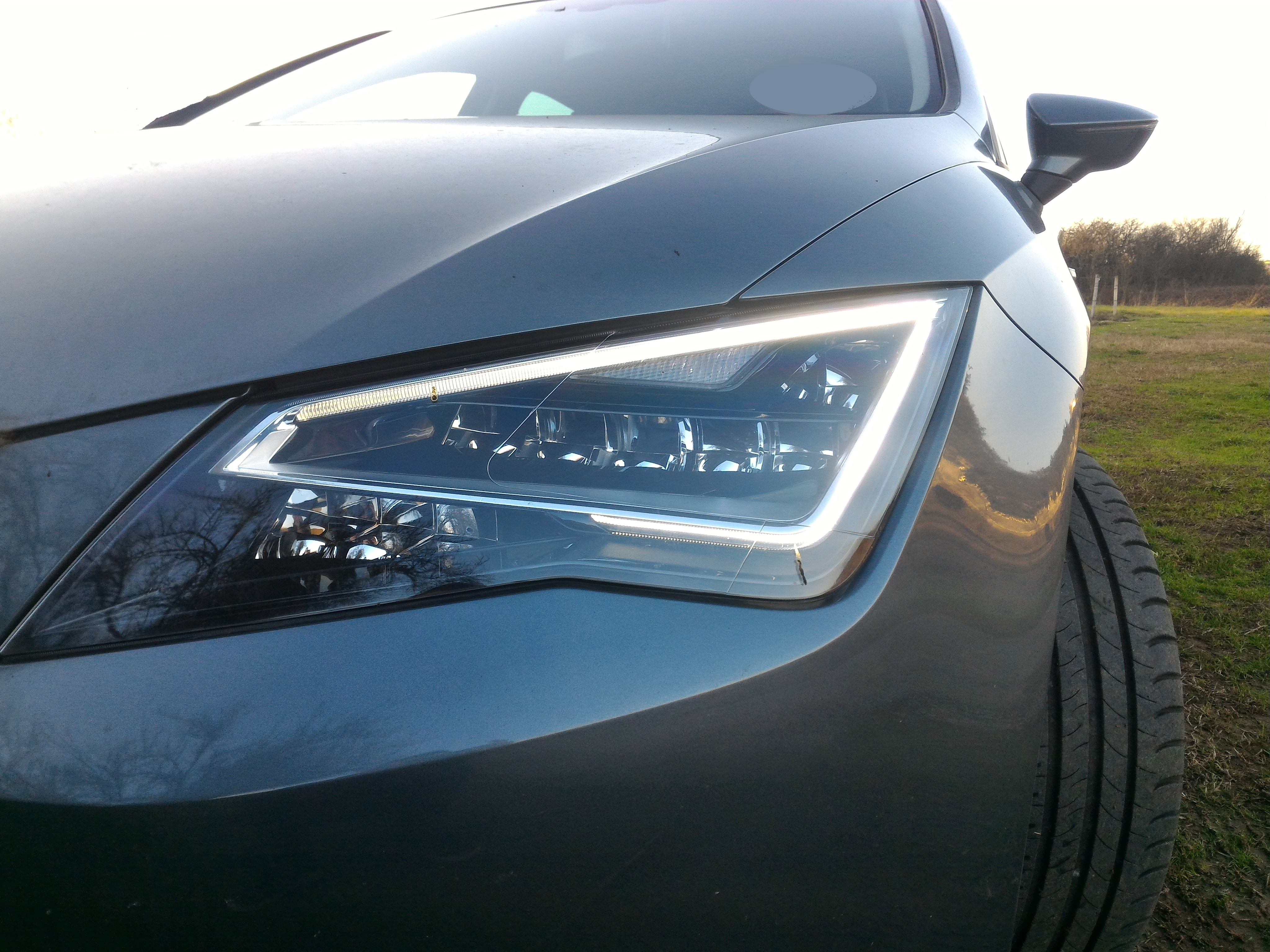 Seat Leon III - feux